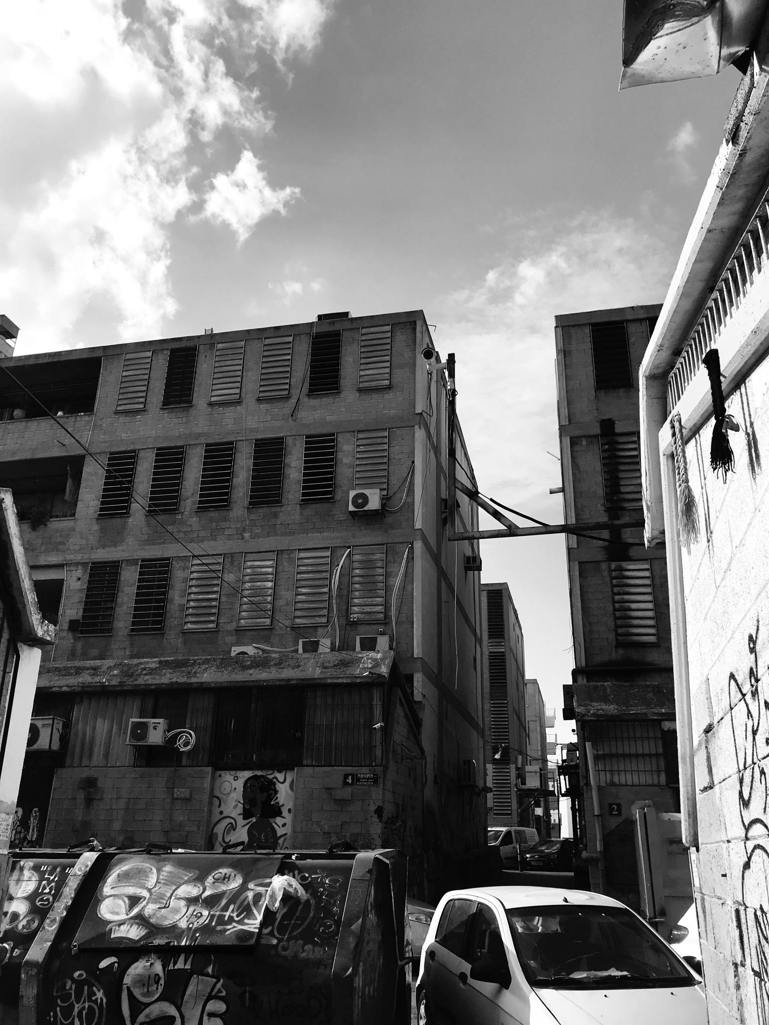 שכונת גבעת הרצל ליד שכונת שפירא בין הרחובות שדרות הר ציון והמפעל, דרום תל אביב.